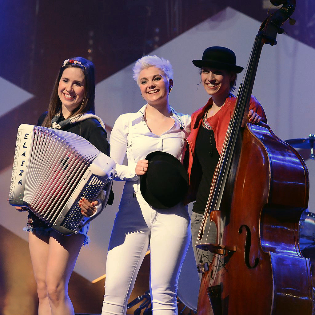 Elaiza bei Unser Song für Dänemark 2014 in Köln.